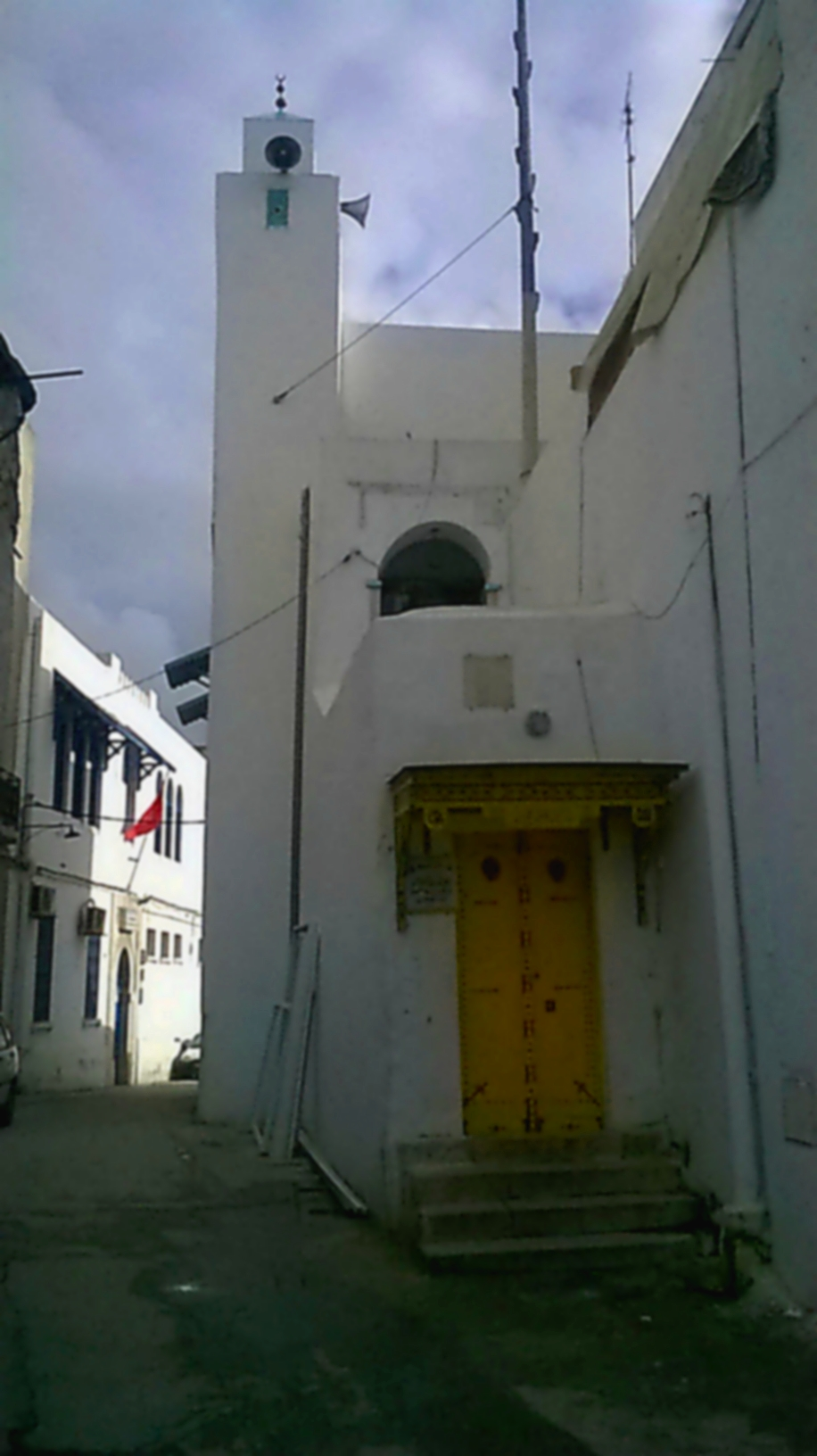 Bab Jedid, médina de Tunis باب جديد، مدينة تونس العتيقة